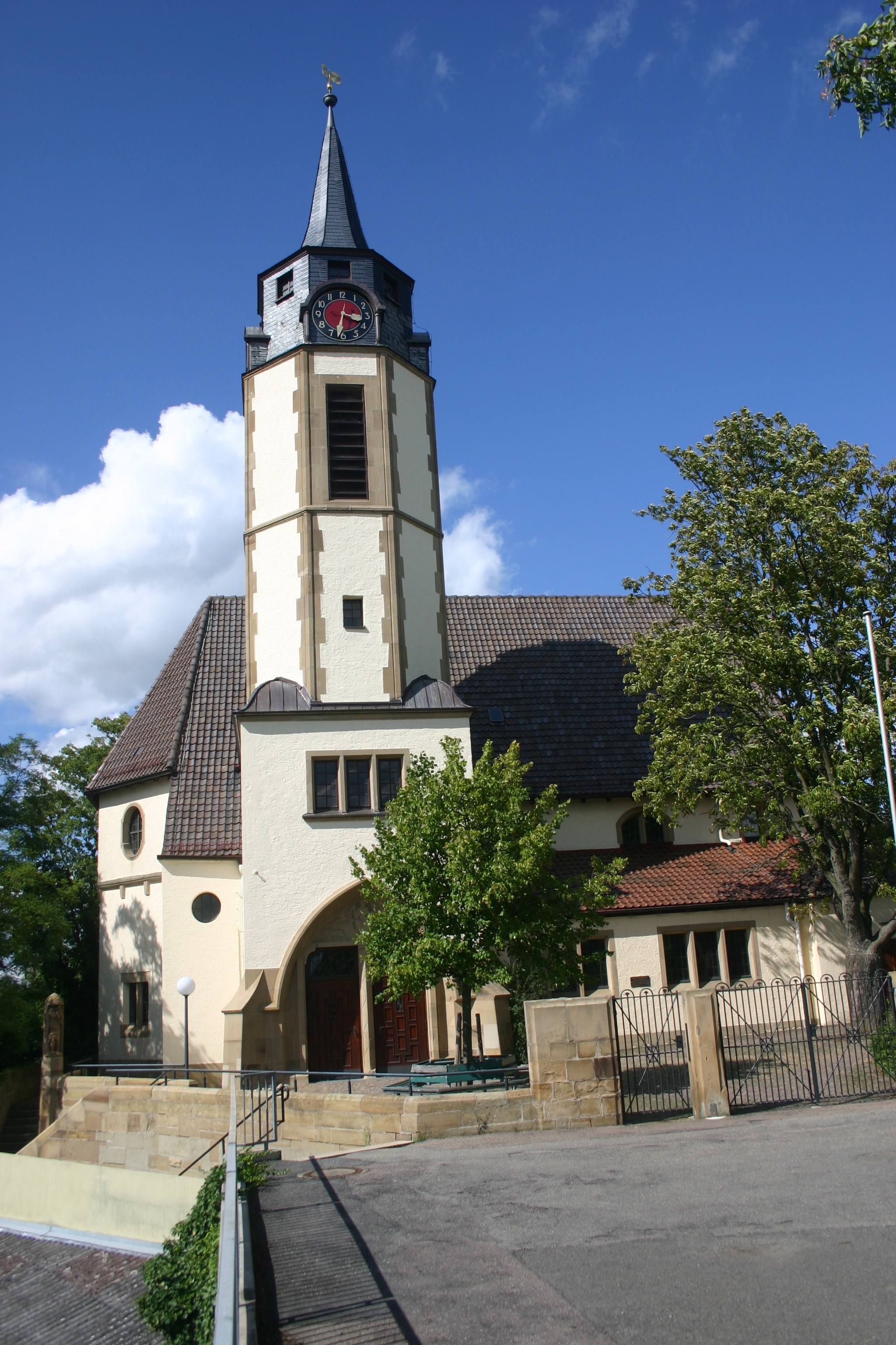 Evangelische Georgskirche zu Massenbach (Schawaigern)